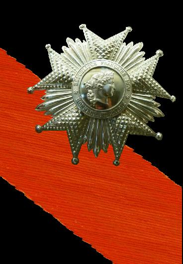 Eigen tekenwerk ( lint) en ster